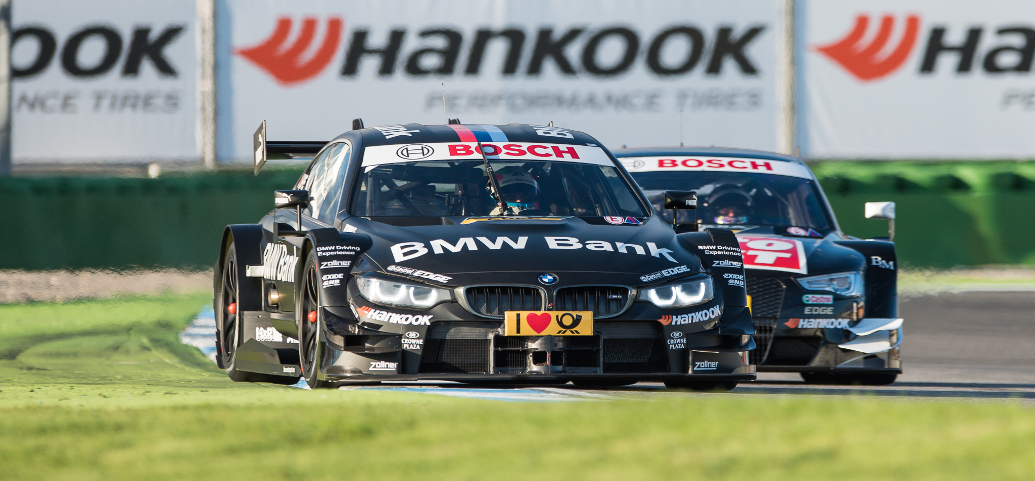 AUTO TEST Audi RS 5 DTM,BMW Bank M4 DTM,Bruno Spengler,DTM,Deutsche Tourenwagen Masters,Hockenheimring,Motorsport,Phoenix Racing GmbH,Schnitzer Motorsport GmbH,Timo Scheider